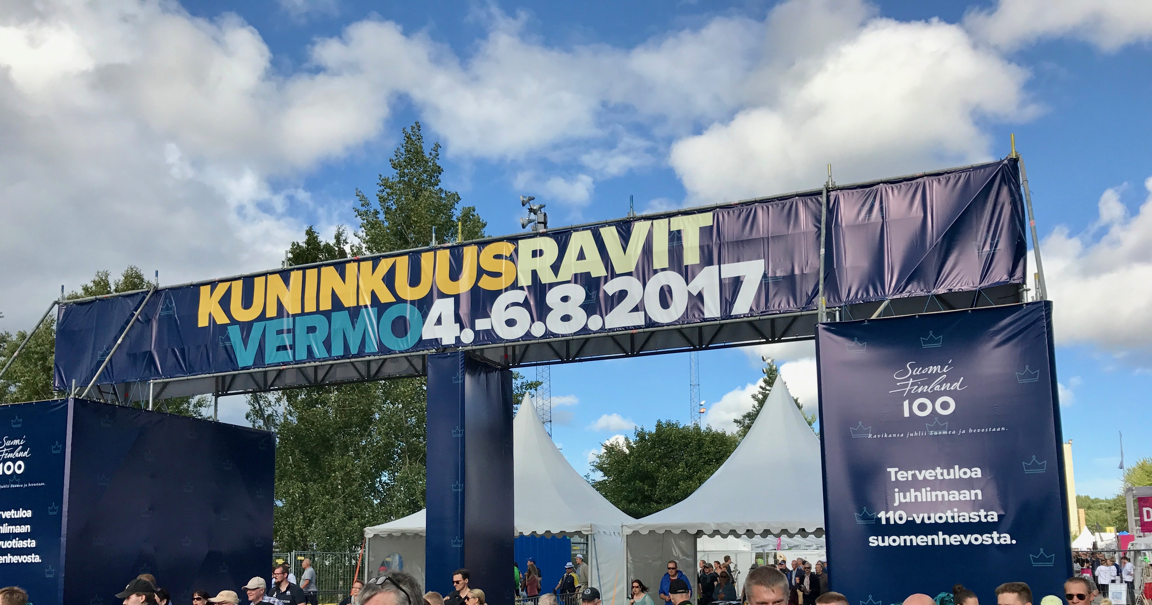 Kuninkuusravien 2017 pääportti Vermossa